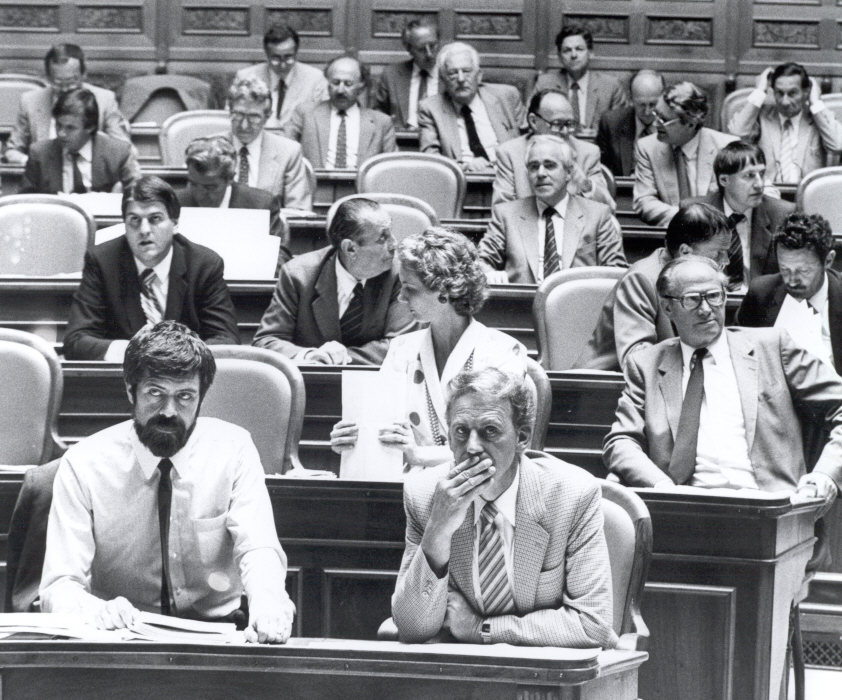 Im Schweizer Nationalrat, Mitglieder der LdU-Fraktion, Paul Günter und Andreas Müller (vorderste Reihe von links), Monika Weber und Sigmund Widmer (zweite Reihe) und Daniel Brélaz (der erste Grüne im Parlament) in der dritten Reihe links